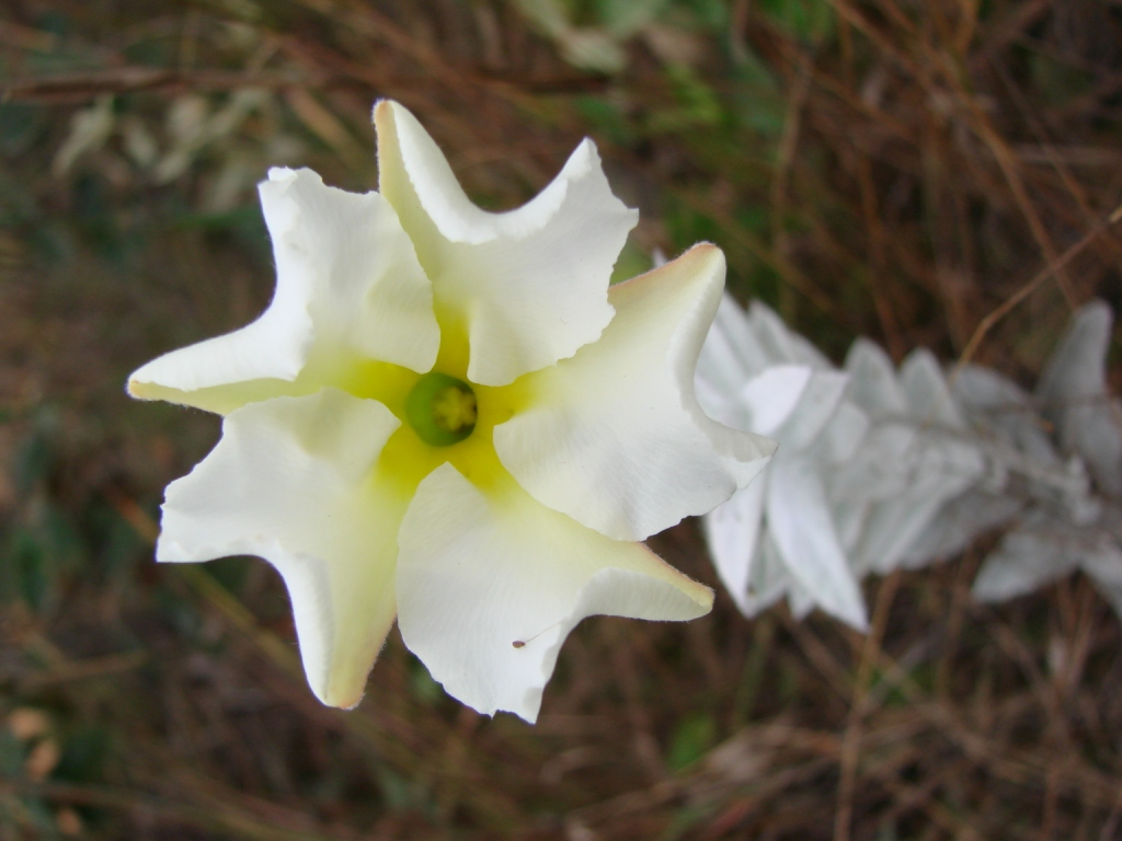 Macrosiphonia velame - APOCYNACEAE - Parque Nacional de Brasília - Distrito Federal - Brasil.